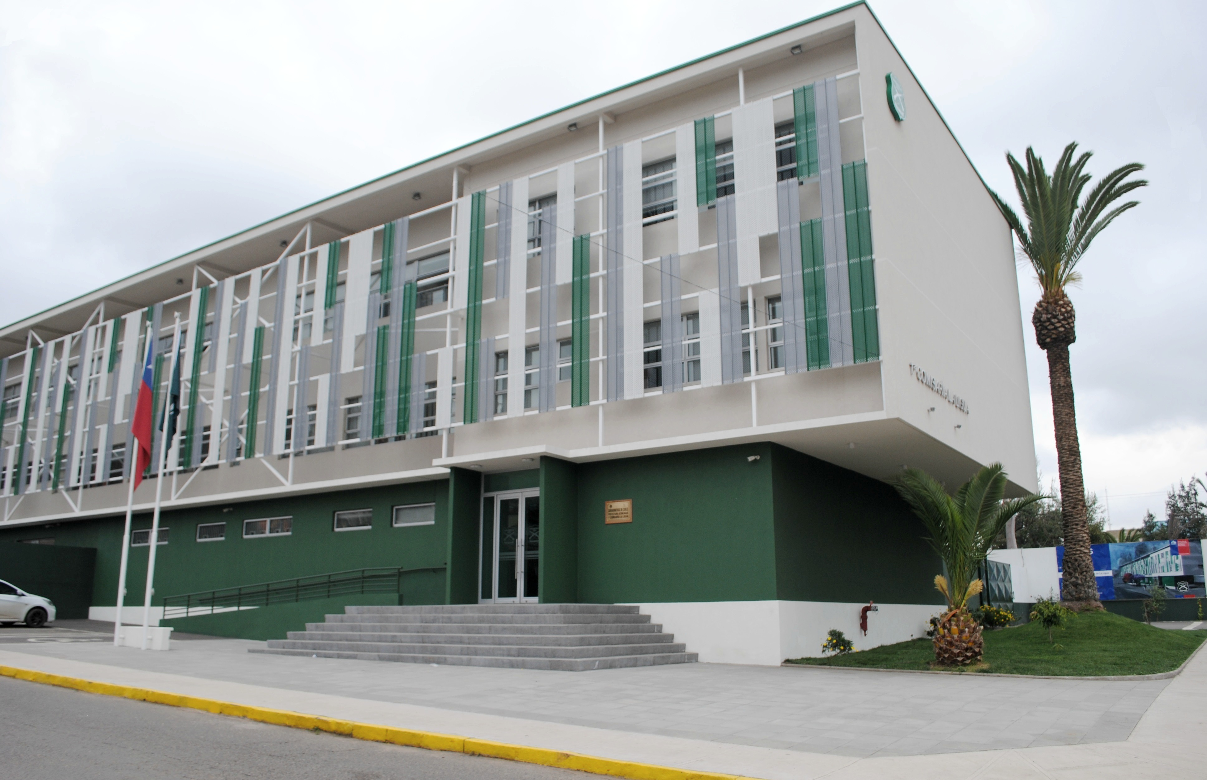 Edificio de Carabineros de la ciudad de La Ligua, Región de Valparaíso, Chile.